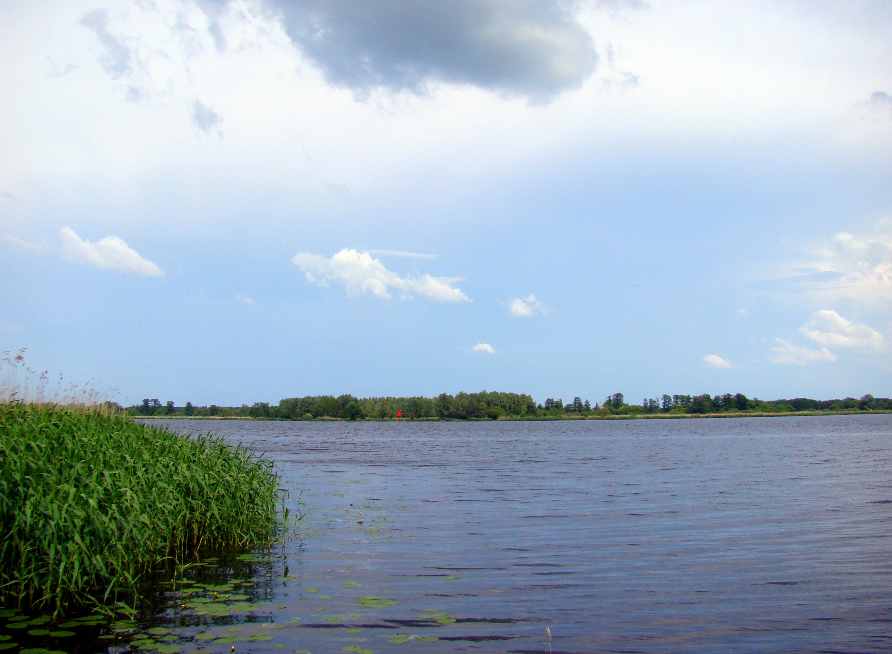 Odra-Domiąża, Województwo zachodniopomorskie, Polska